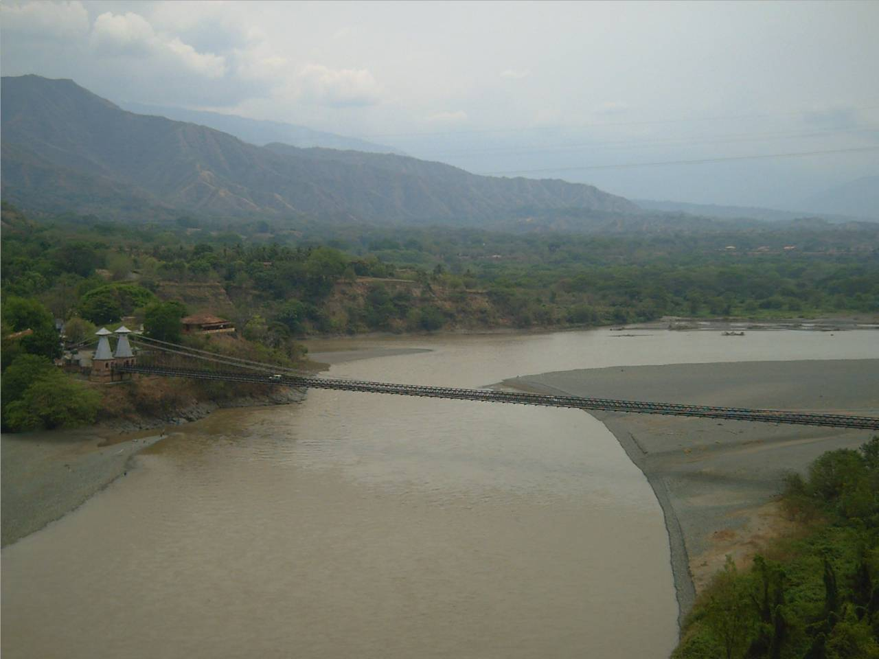 Puente de Occidente, construido en 1895, cruza el río Cauca entre los municipios de Santa Fe de Antioquia y Olaya, Departamento de Antioquia.